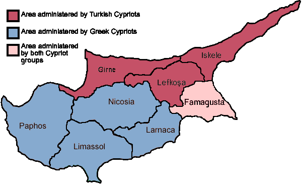 Plan de Chypre réunifiée en 8 provinces